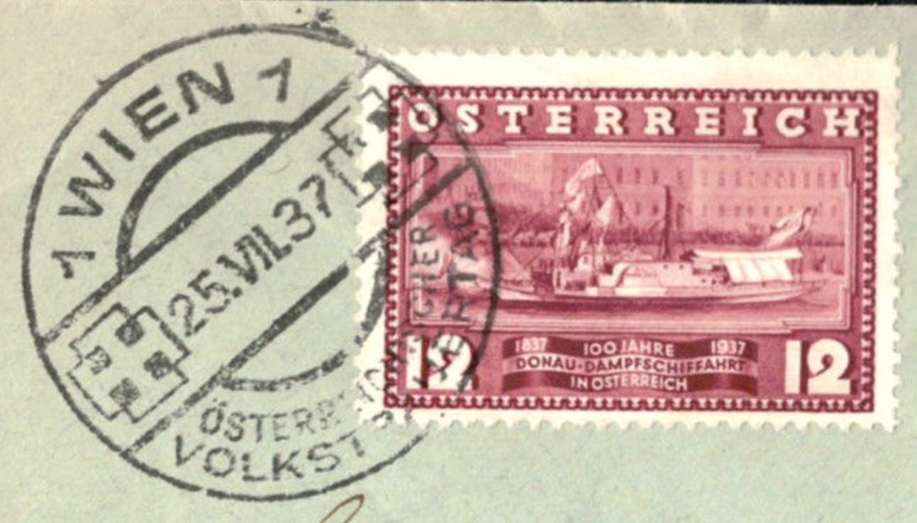 100 Jahre Erstfahrt Wien-Linz der "Maria Anna" Dampfer "Maria Anna" (1837) an der Donaulände in Wien 12 Groschen, Mi639. Sonderstempel "Österreichischer Volkstrauertag 25. Juli 1937".